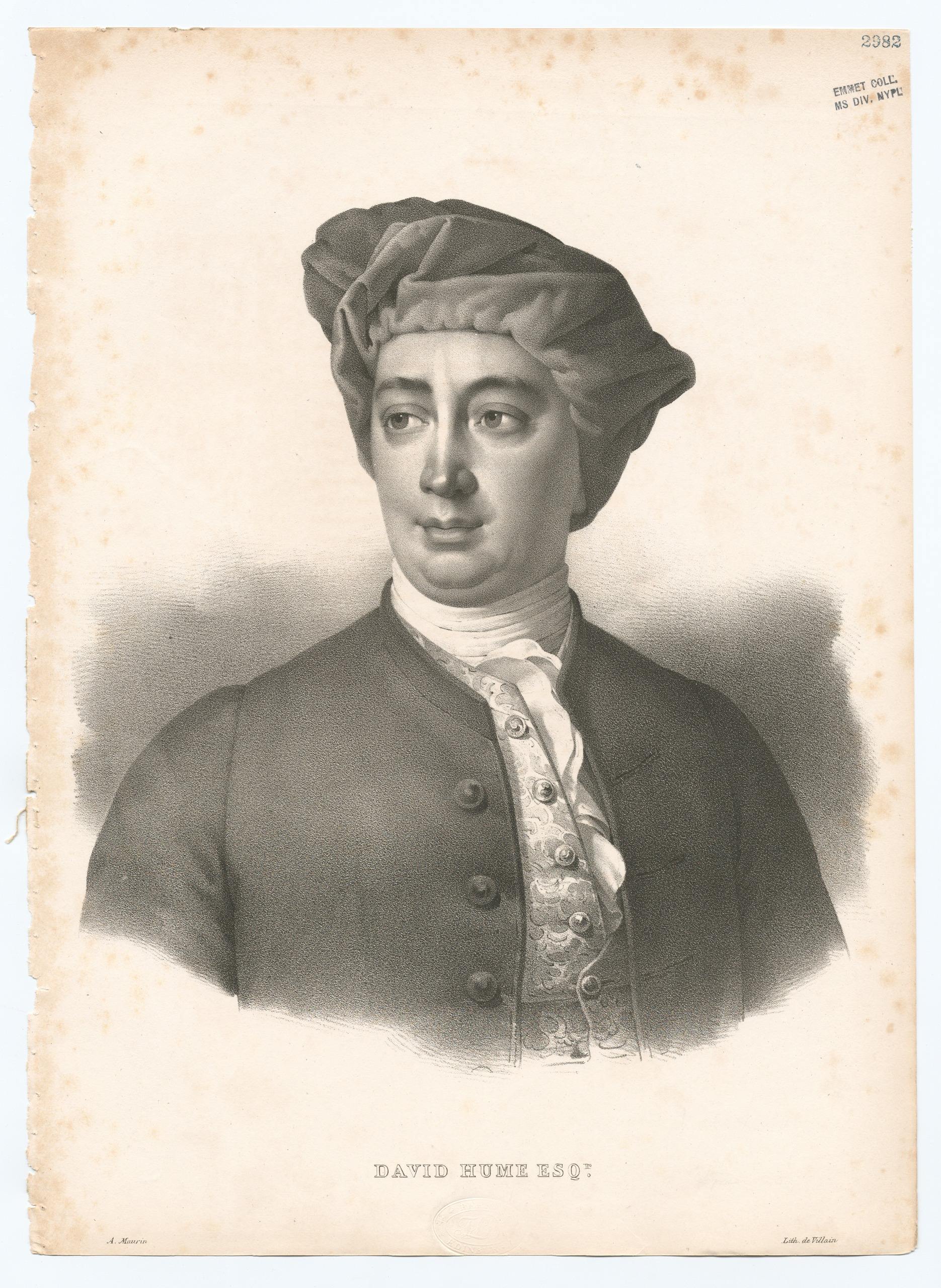 Litografia de David Hume